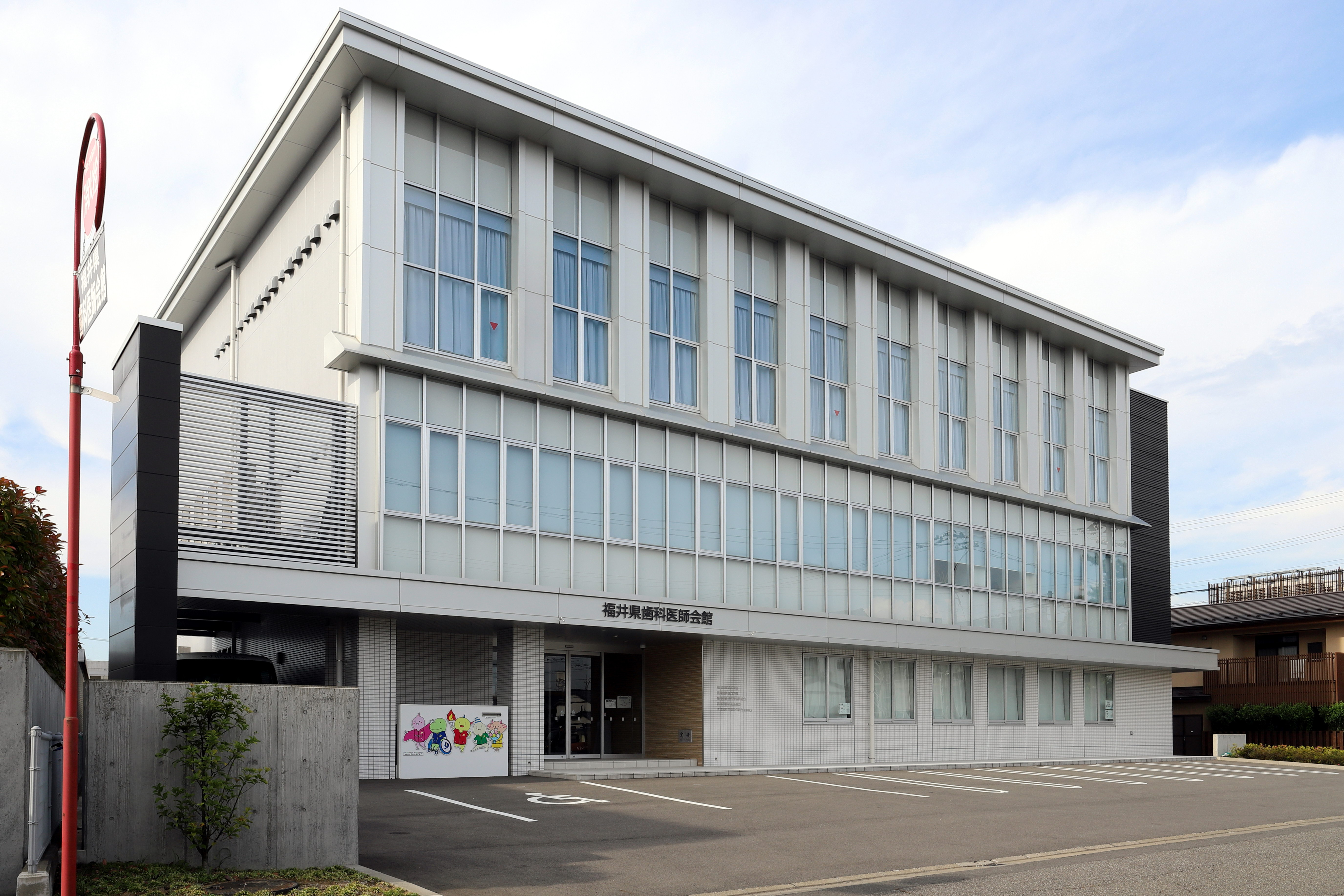 福井県歯科医師会館 Canon EOS 6D Mark II